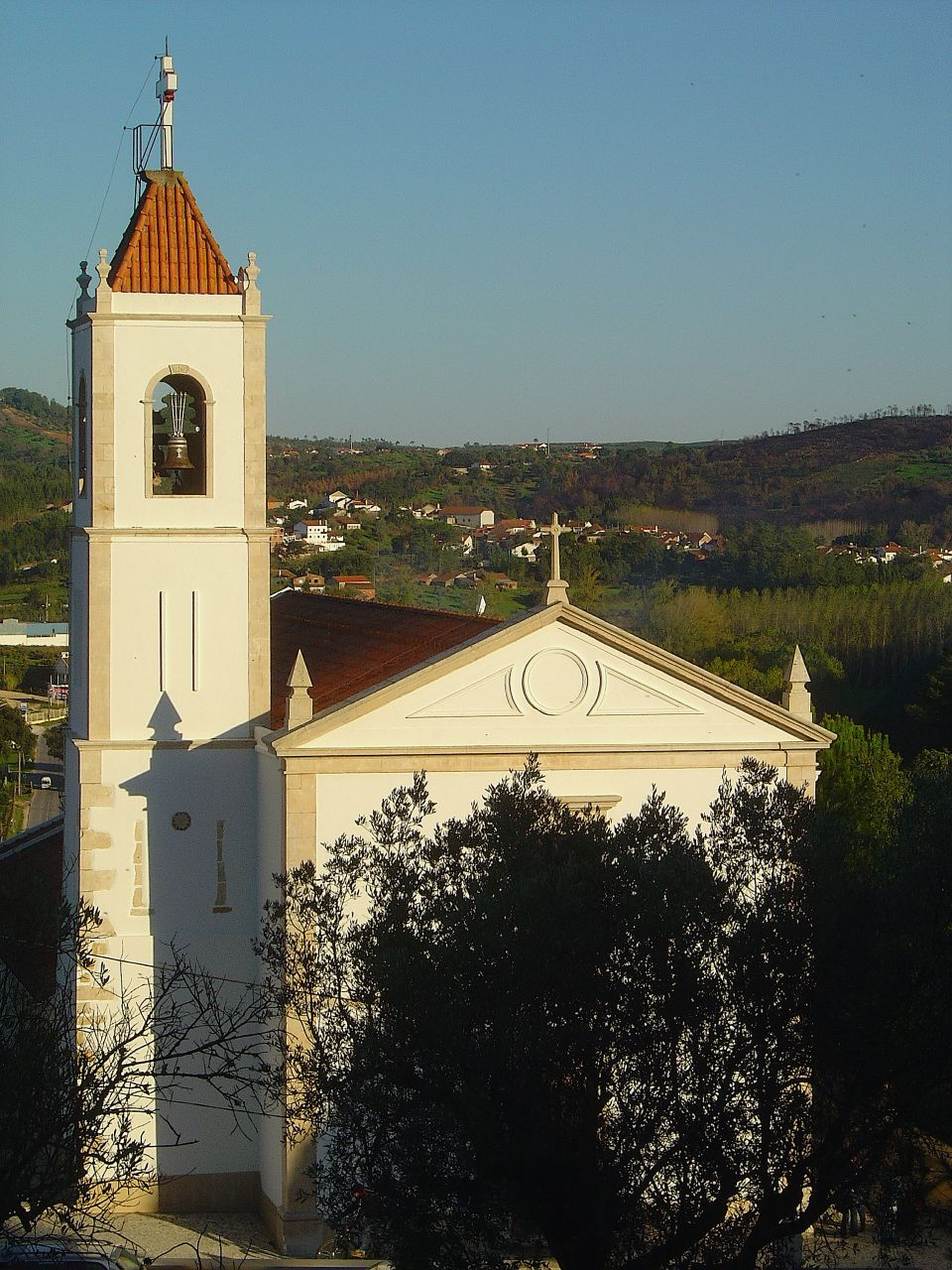 Alcanede